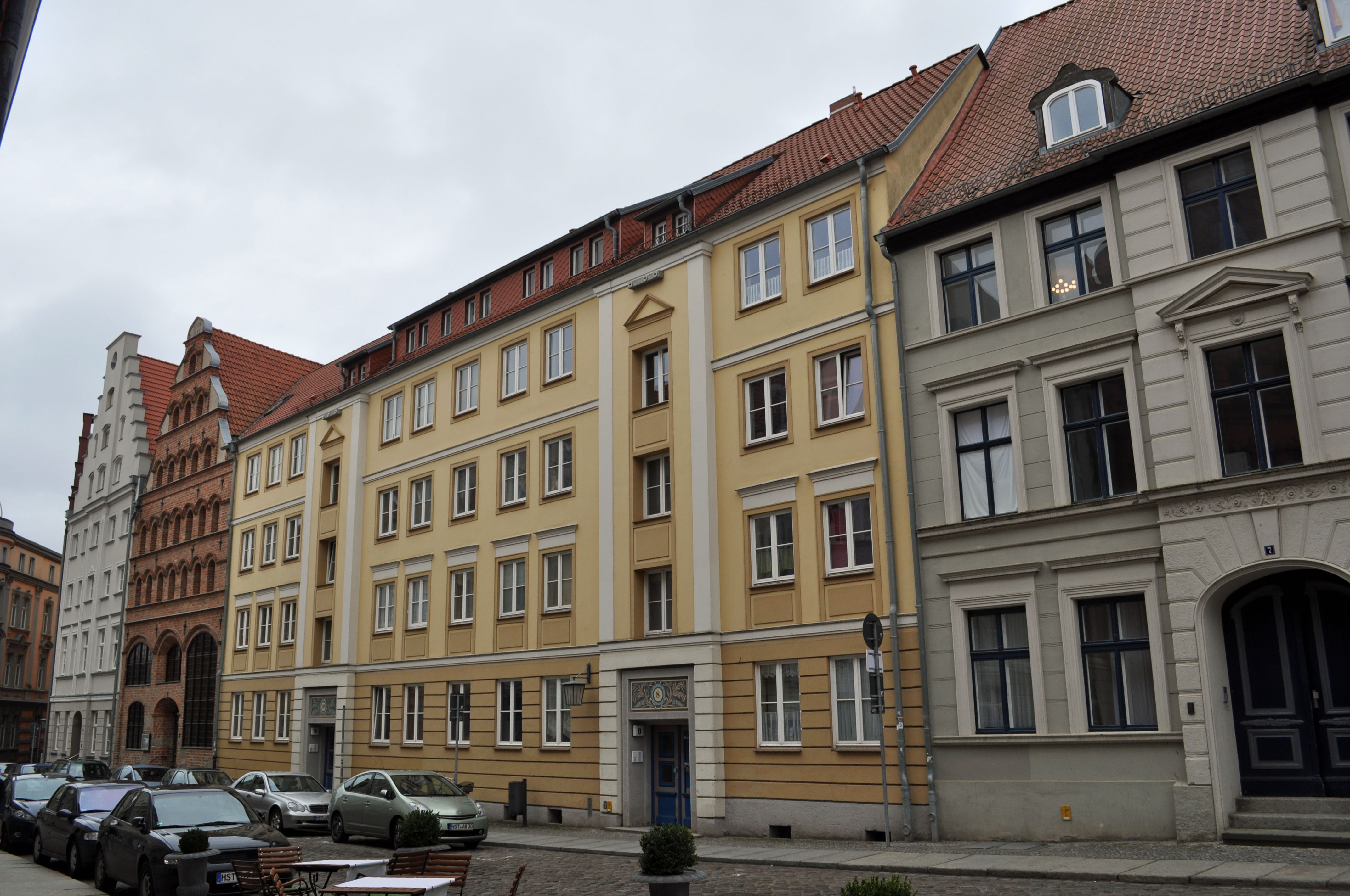 Gebäude bzw. Gebäudedetail in Stralsund. Straße und Hausnummer siehe Dateiname.